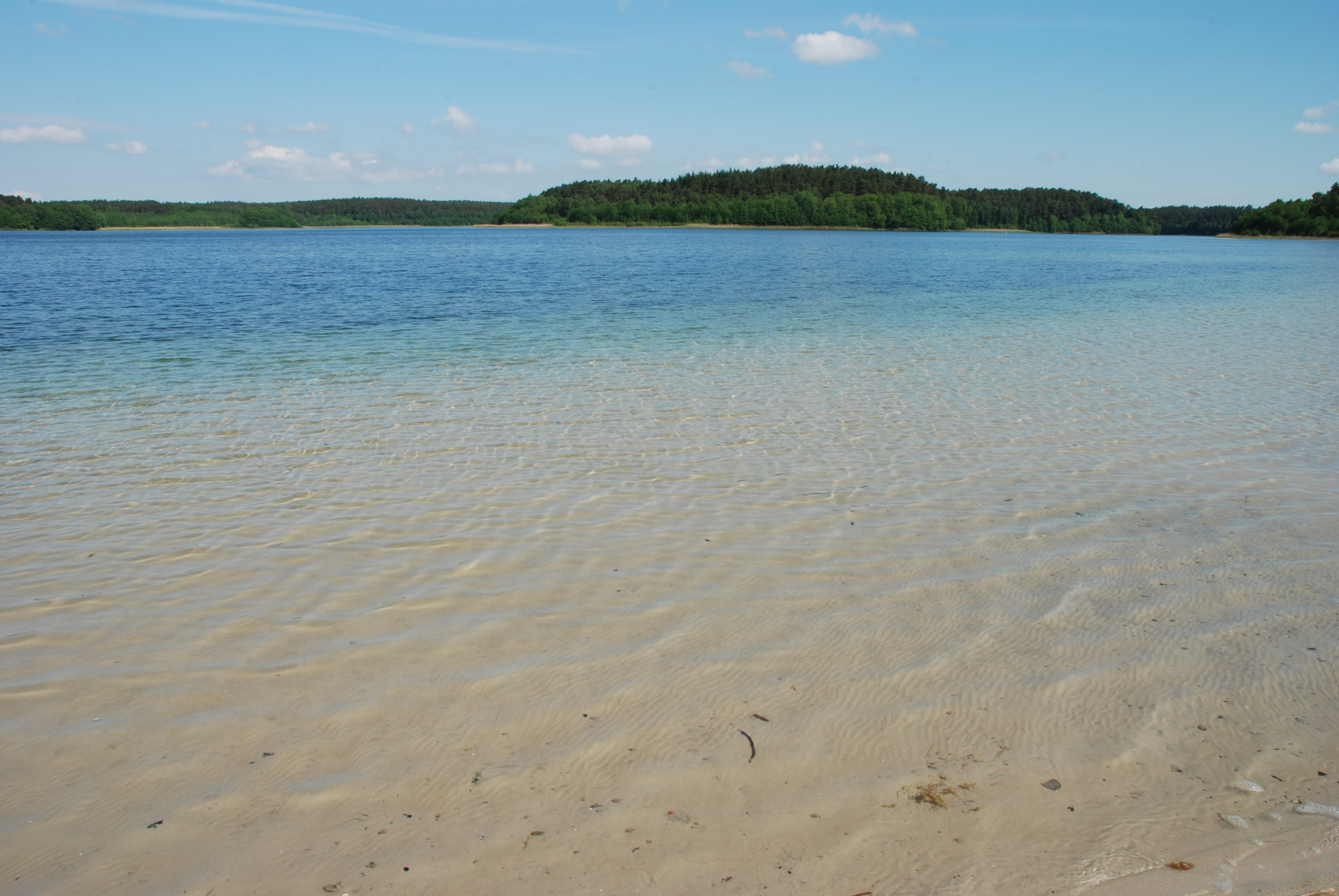 Südostblick auf den Großen Fürstenseer See